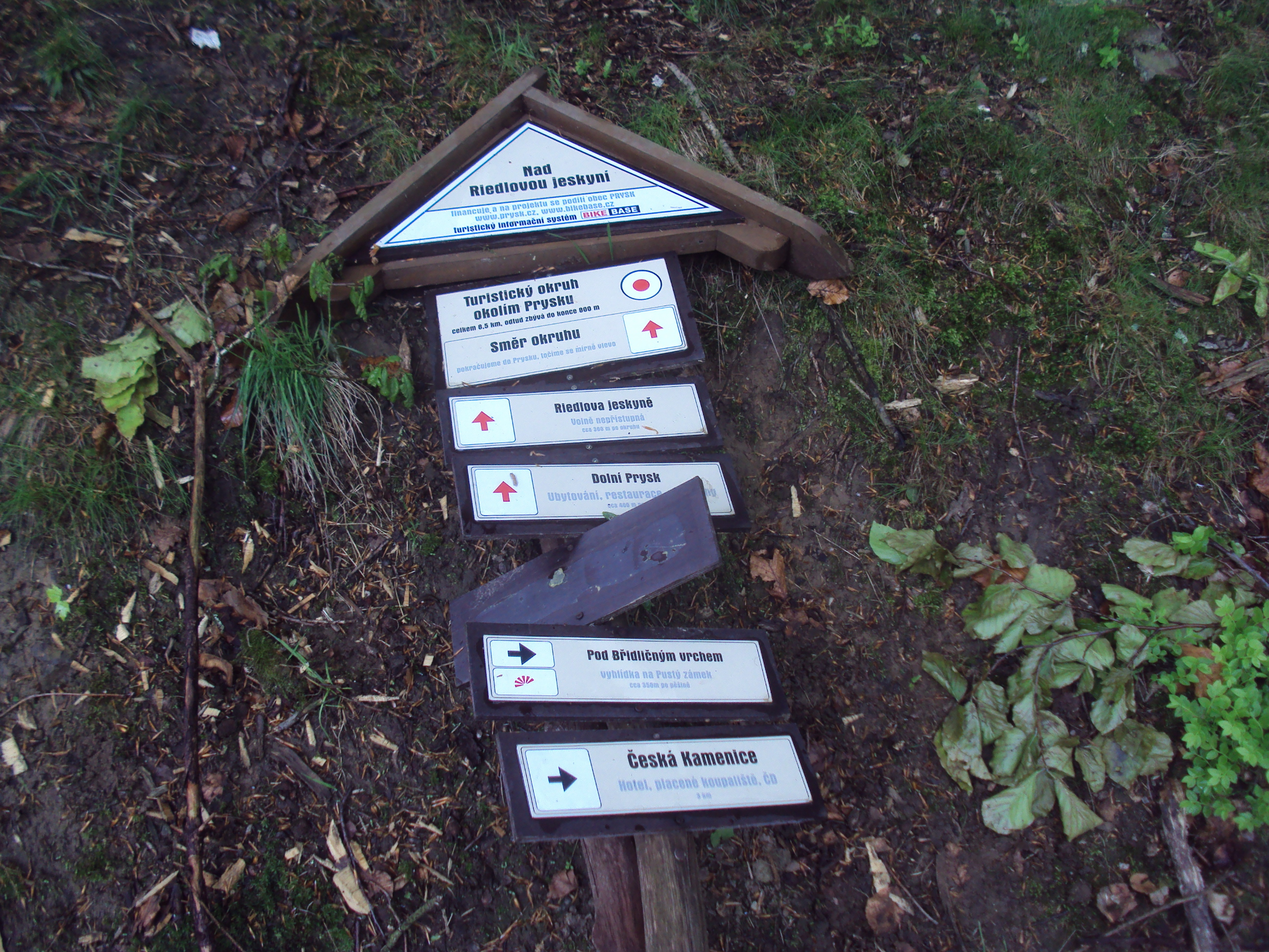 Rozcestník Nad Riedlovou jeskyní